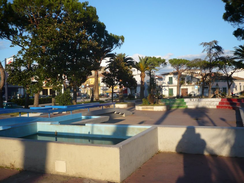 Piazza Aldo Moro, Villa Comunale